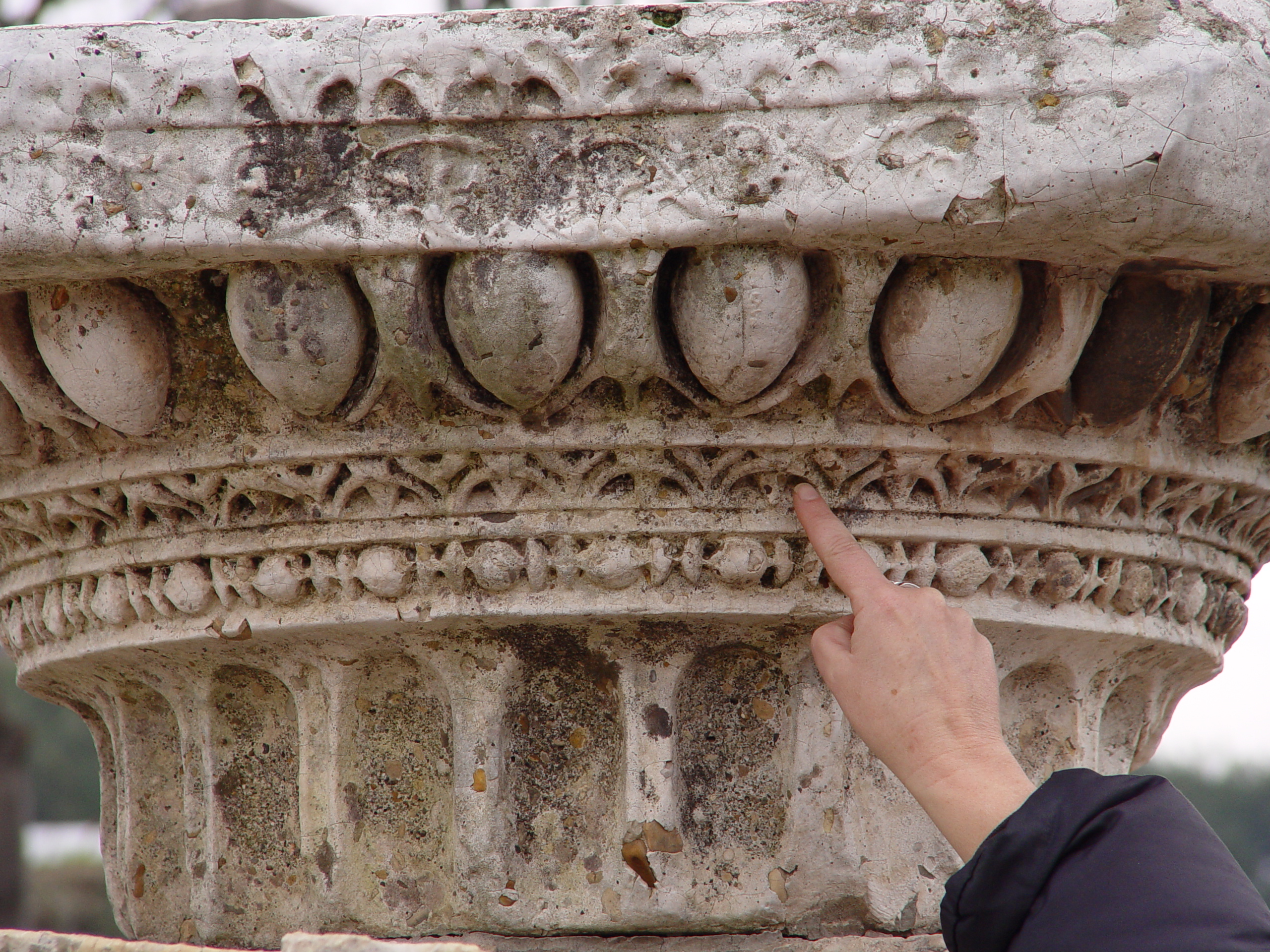 Raduni/Roma 2011 - 10 anni di Wikipedia: le modanature del capitello dorico decorato dell'arco di Augusto